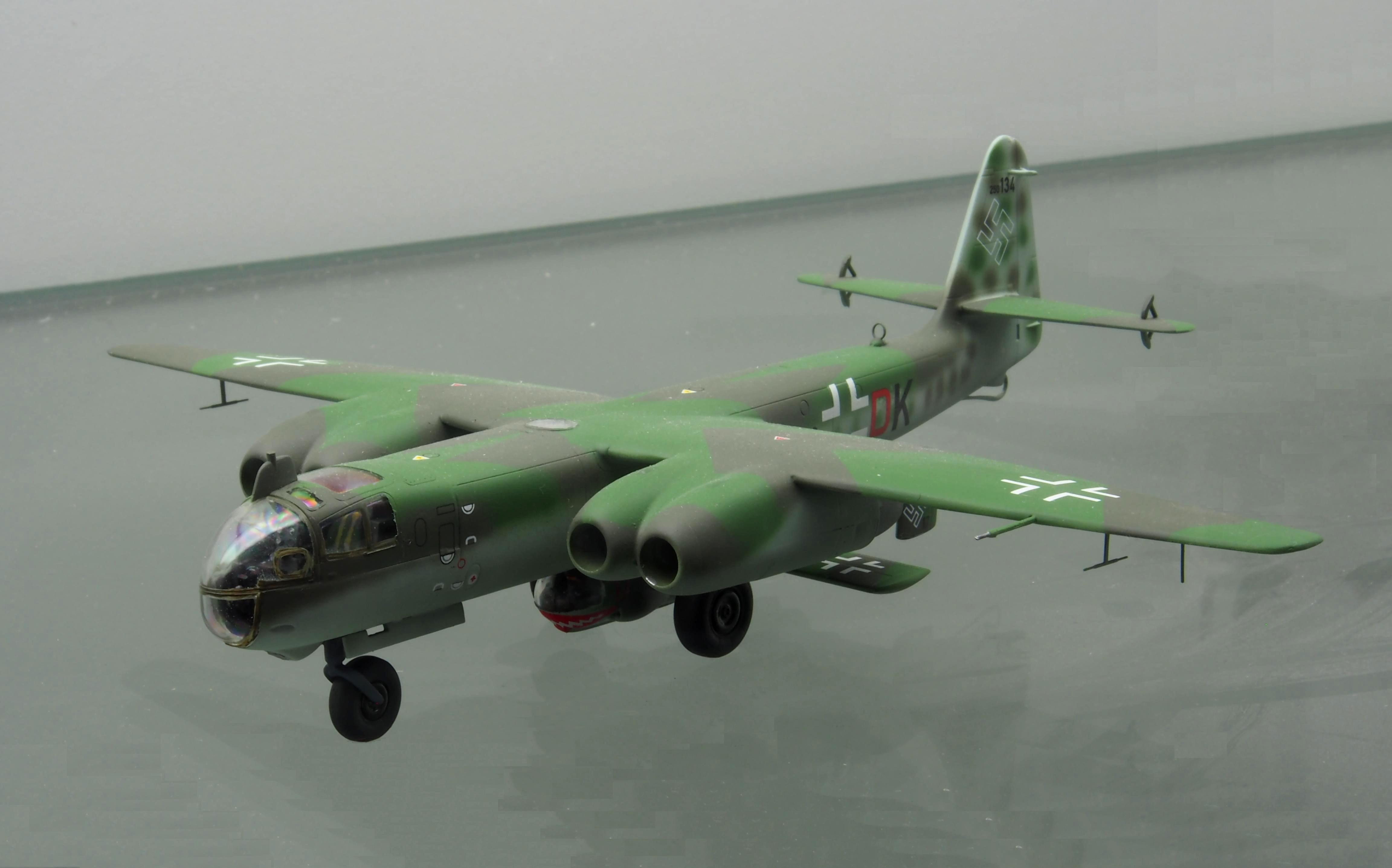 Model of Arado Ar 234 V21 carrying an Arado E.381